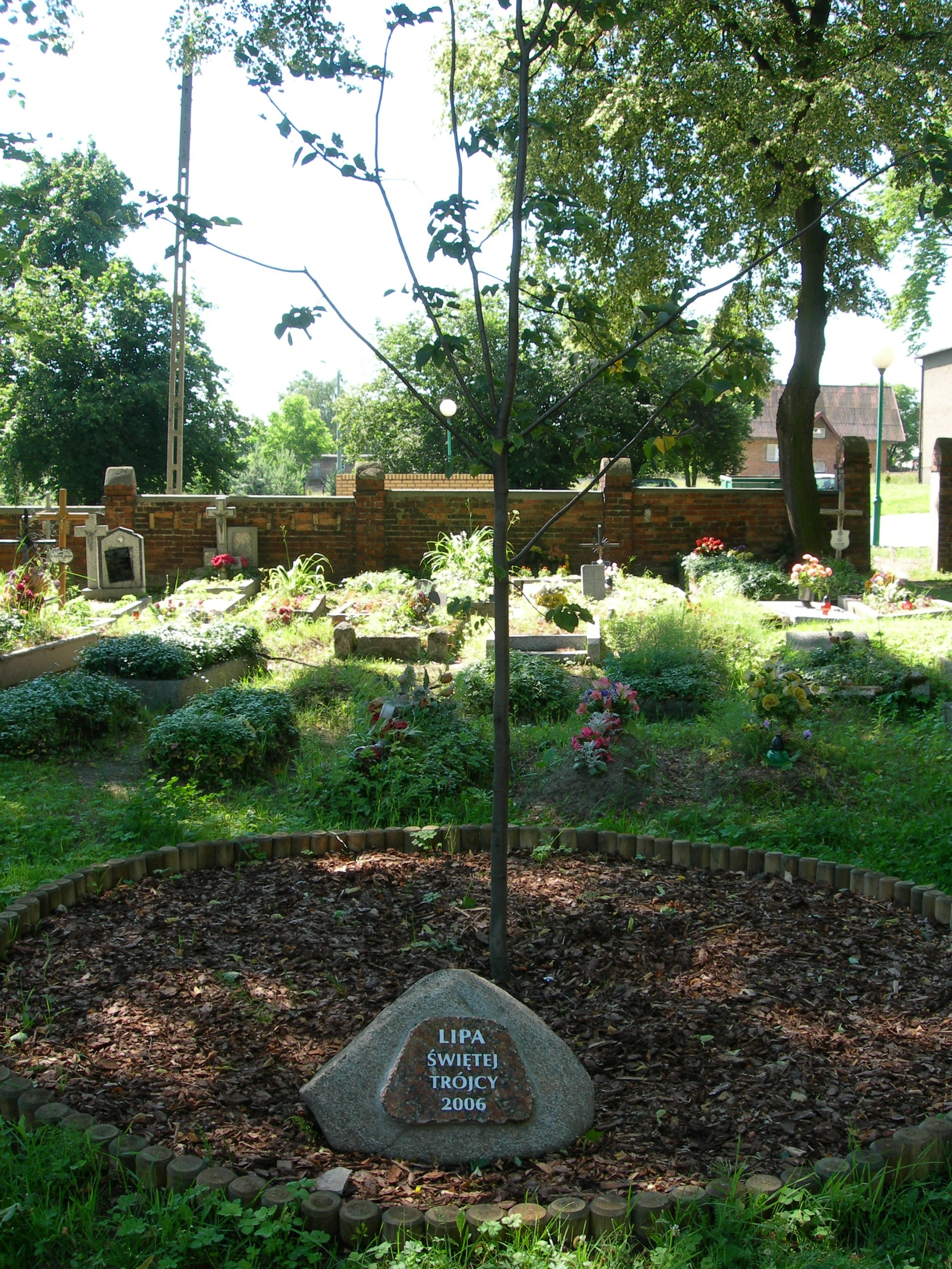 Lipa Świętej Trójcy w Leszczynach (woj. śląskie). 2006